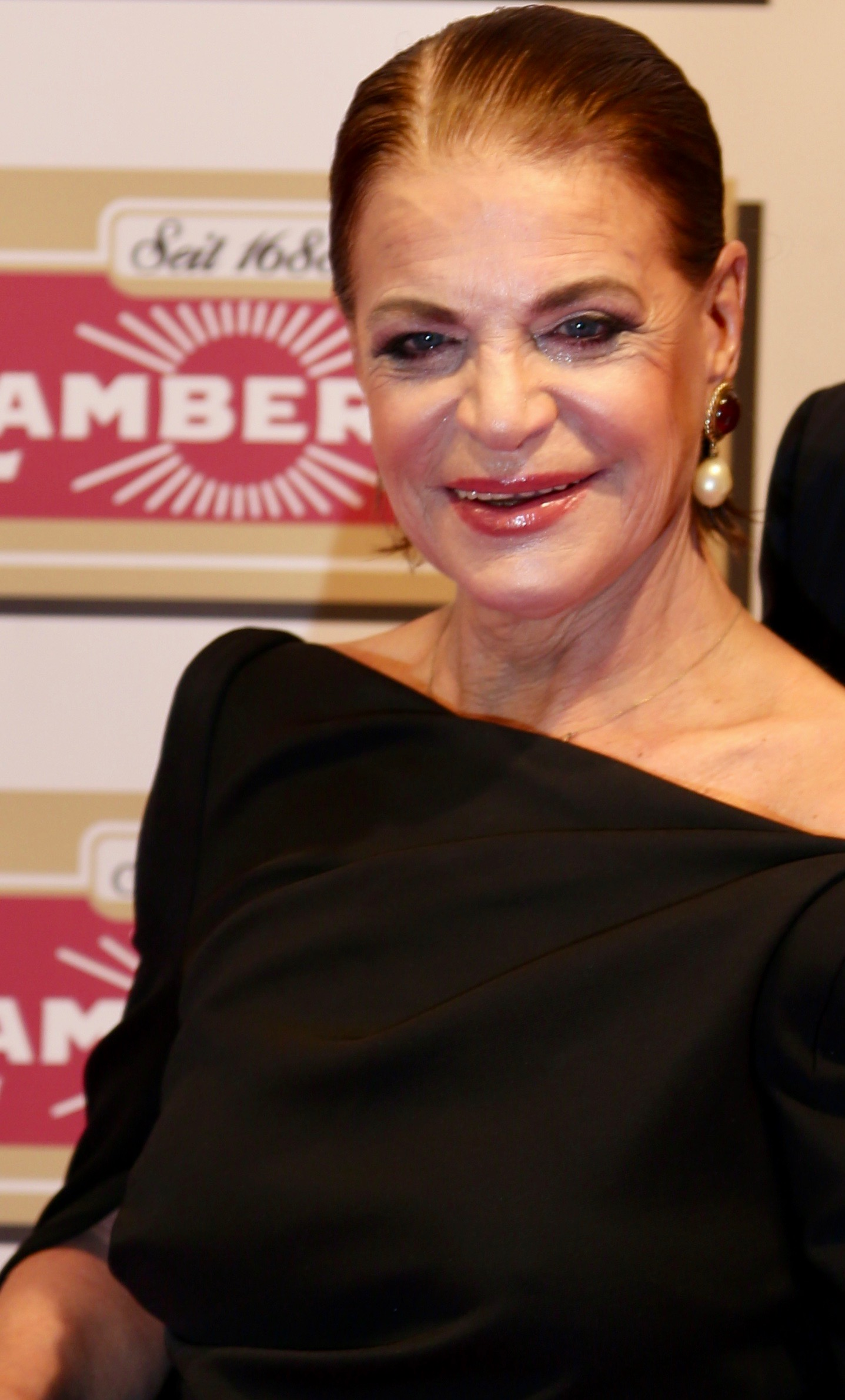 Barbara Engel bei der Lambertz Monday Night 2017.